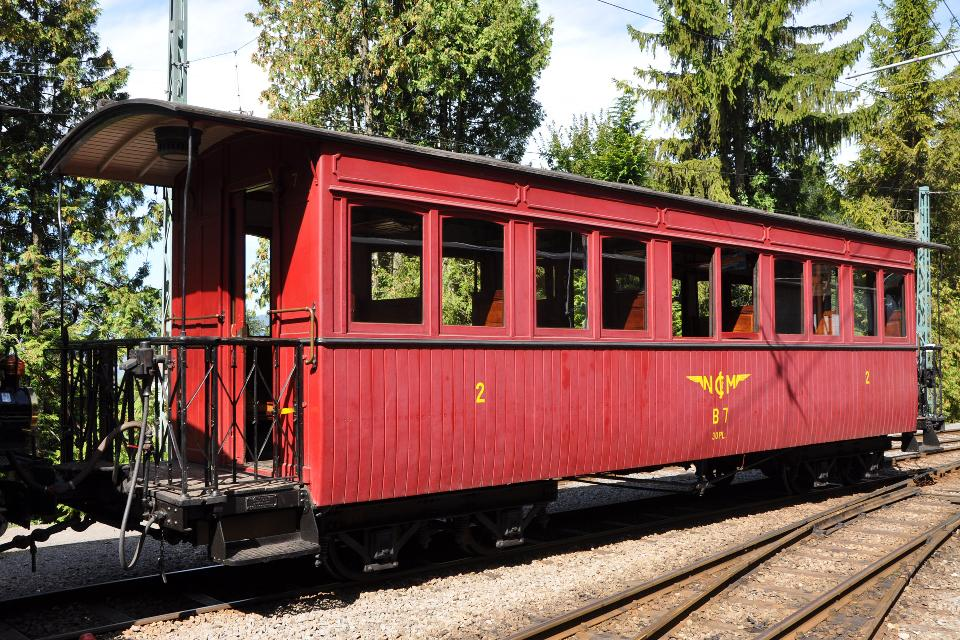 Personenwagen C4 7 der Nyon–Saint-Cergue–Morez-Bahn bei der Museumsbahn Blonay-Chamby (BC) in Chamby-Musée (Chaulin) im Sommer 2010.